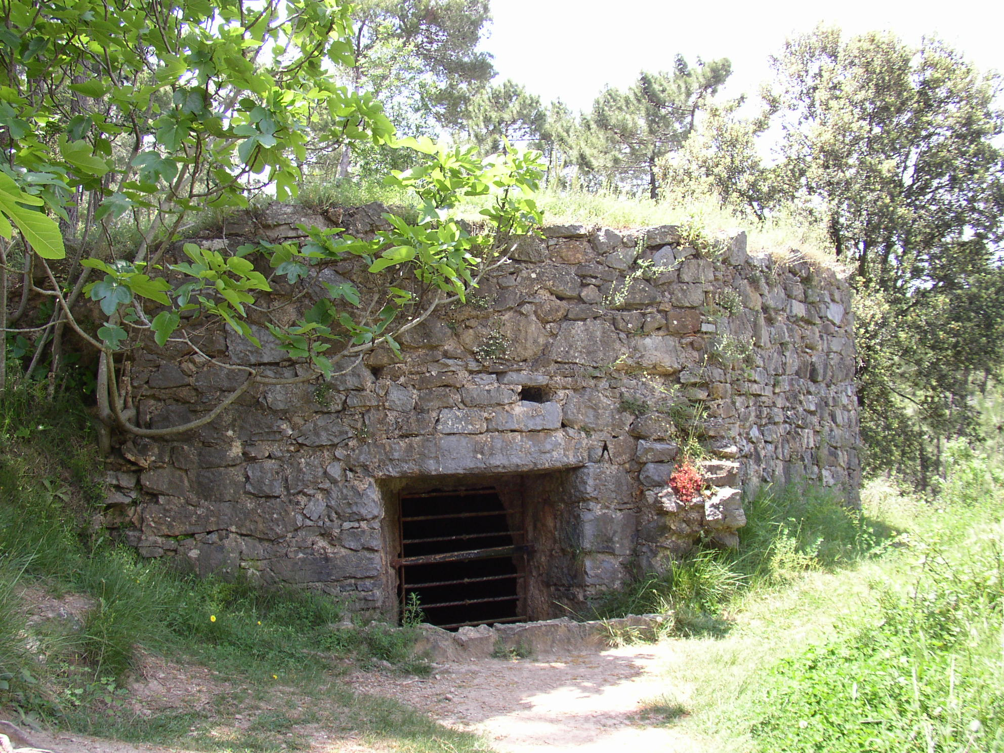 Nevera del S. XVII. Algimia de Almonacid, Castellón (Comunidad Valenciana) España. Fotografía realizada el 19 mayo de 2006 por el autor User: Pelayo2